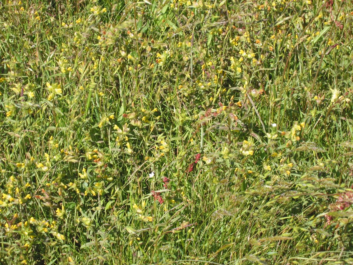 zelfgemaakte foto van vegetatie De Nederlanden; eind mei